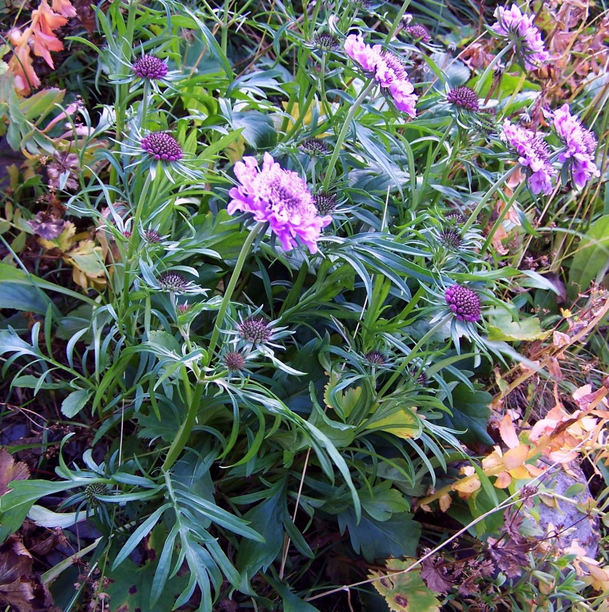 Scabiosa lucida (pl. driakiew lśniąca), habitat: Tatra Mountains, Ciemniak